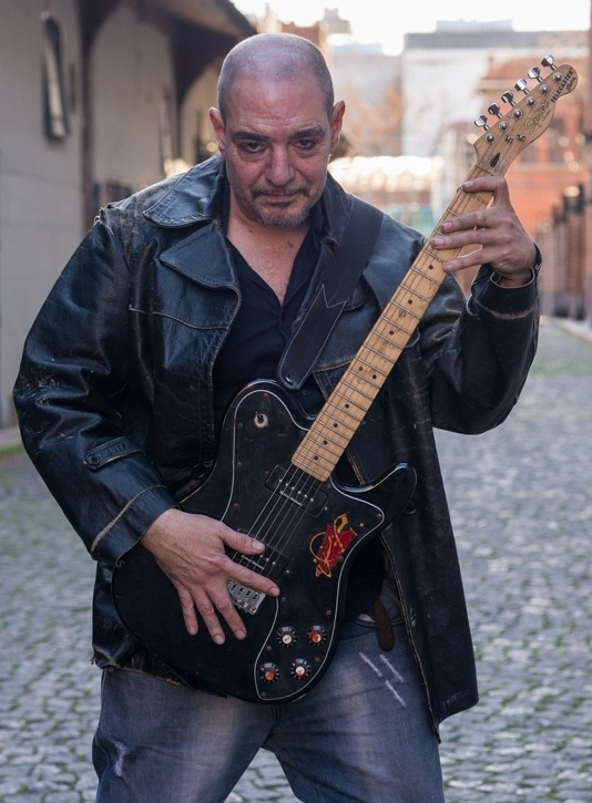 Ulises Butrón en 2015.